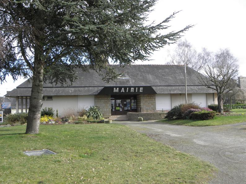 Mairie de Sains (35).